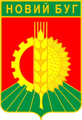 Герб Нового Буга